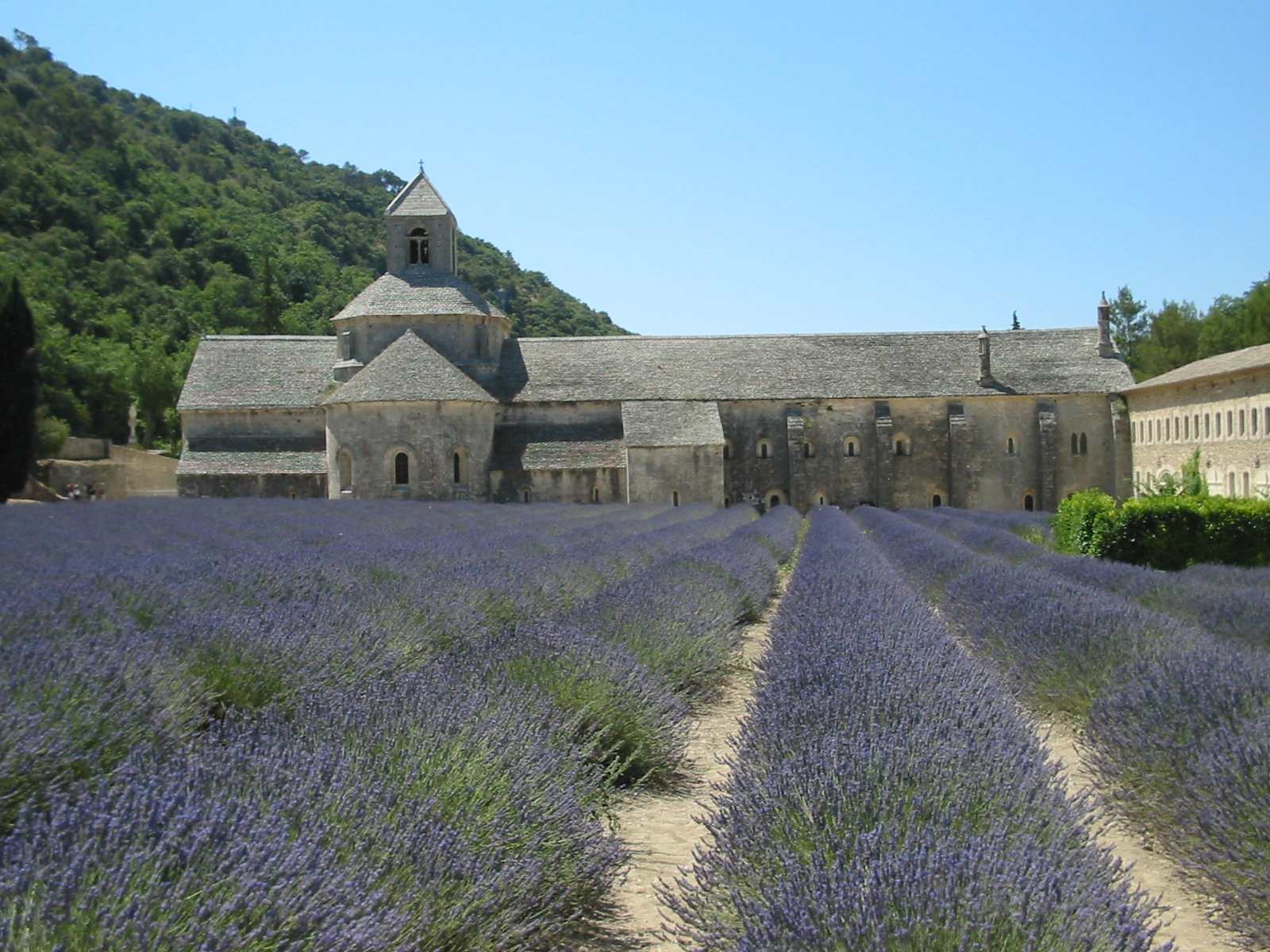 Abbaye de Sénanque avec la lavande